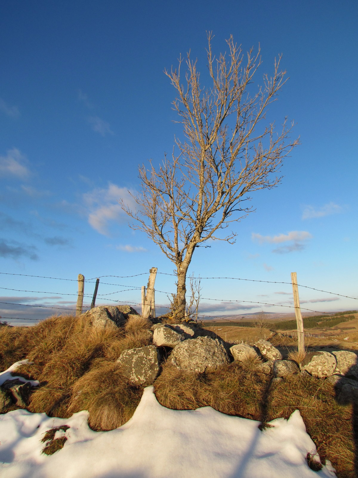 Hêtre déformé par le vent à 1100m d'altitude. plateau près de Fortunies (commune de Dienne, Cantal)